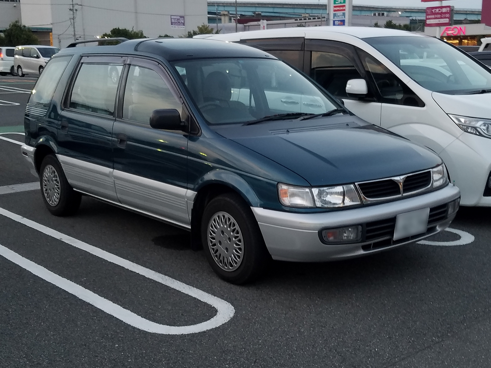 シャリオ リゾートランナーMS（1997年モデル）